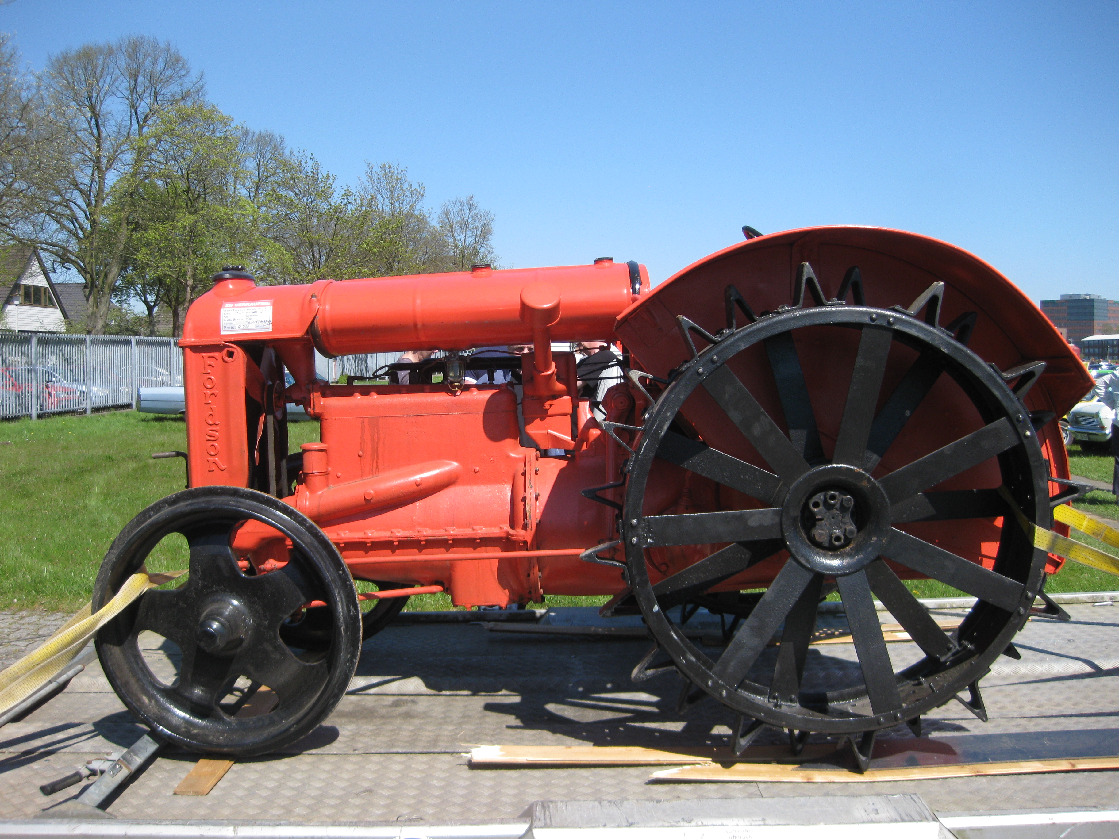 Traktor Fordson Seitenansicht